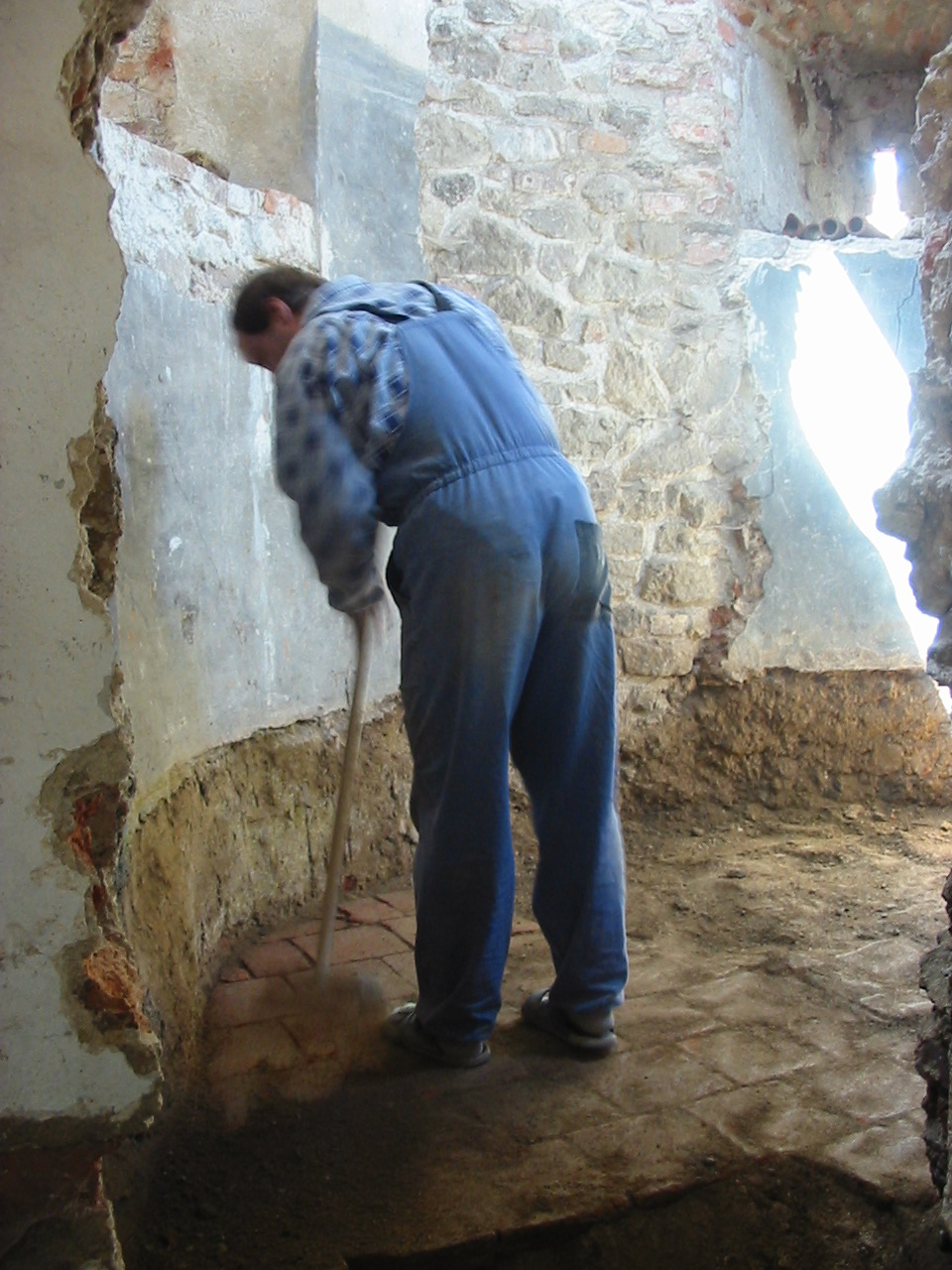 Interiér nárožní věže